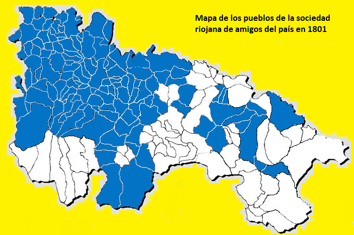 Es un mapa de los pueblos (en Azul) que formaban parte de la sociedad riojana de amigos del país en 1801.